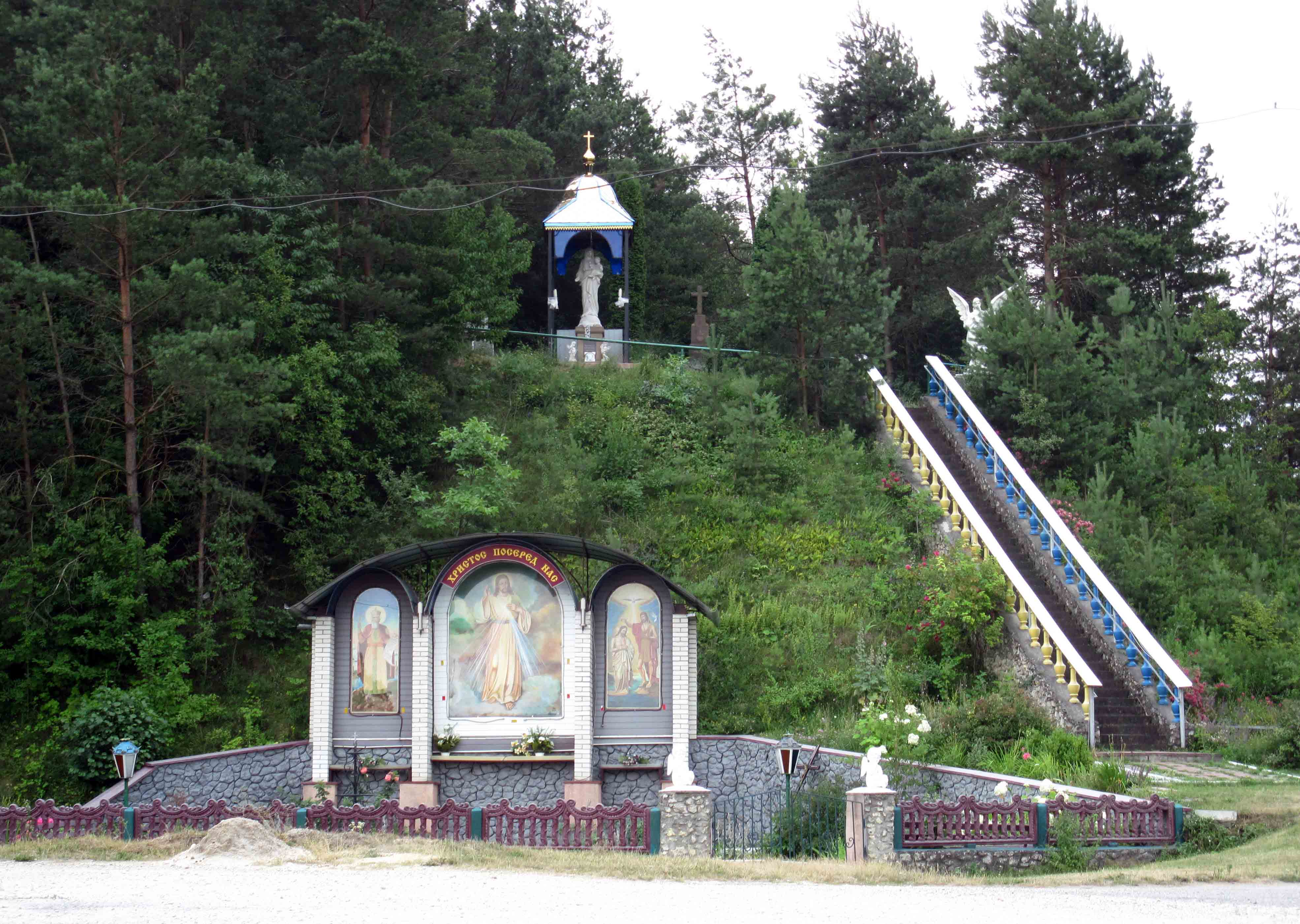 Хресна дорога у Загір’ї Зборівського району Тернопільської області